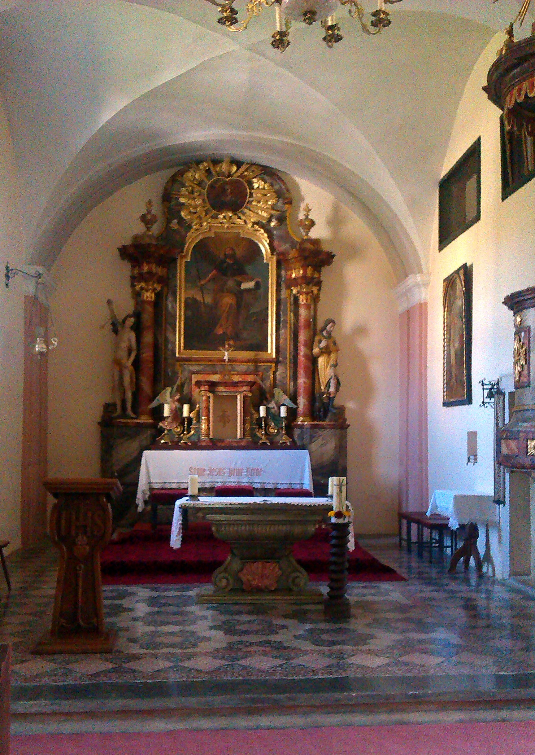 Kath. Filialkirche hl. Jakob